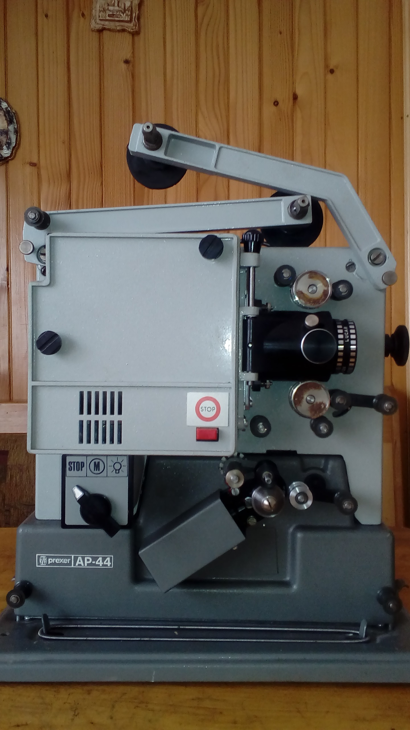 Projektor AP-44